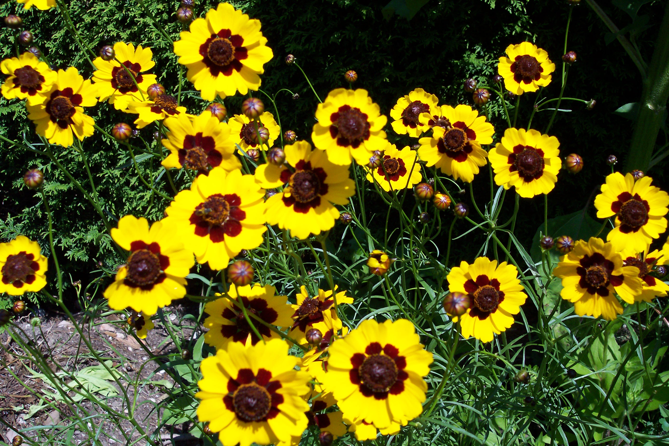 Mädchenauge bicolor